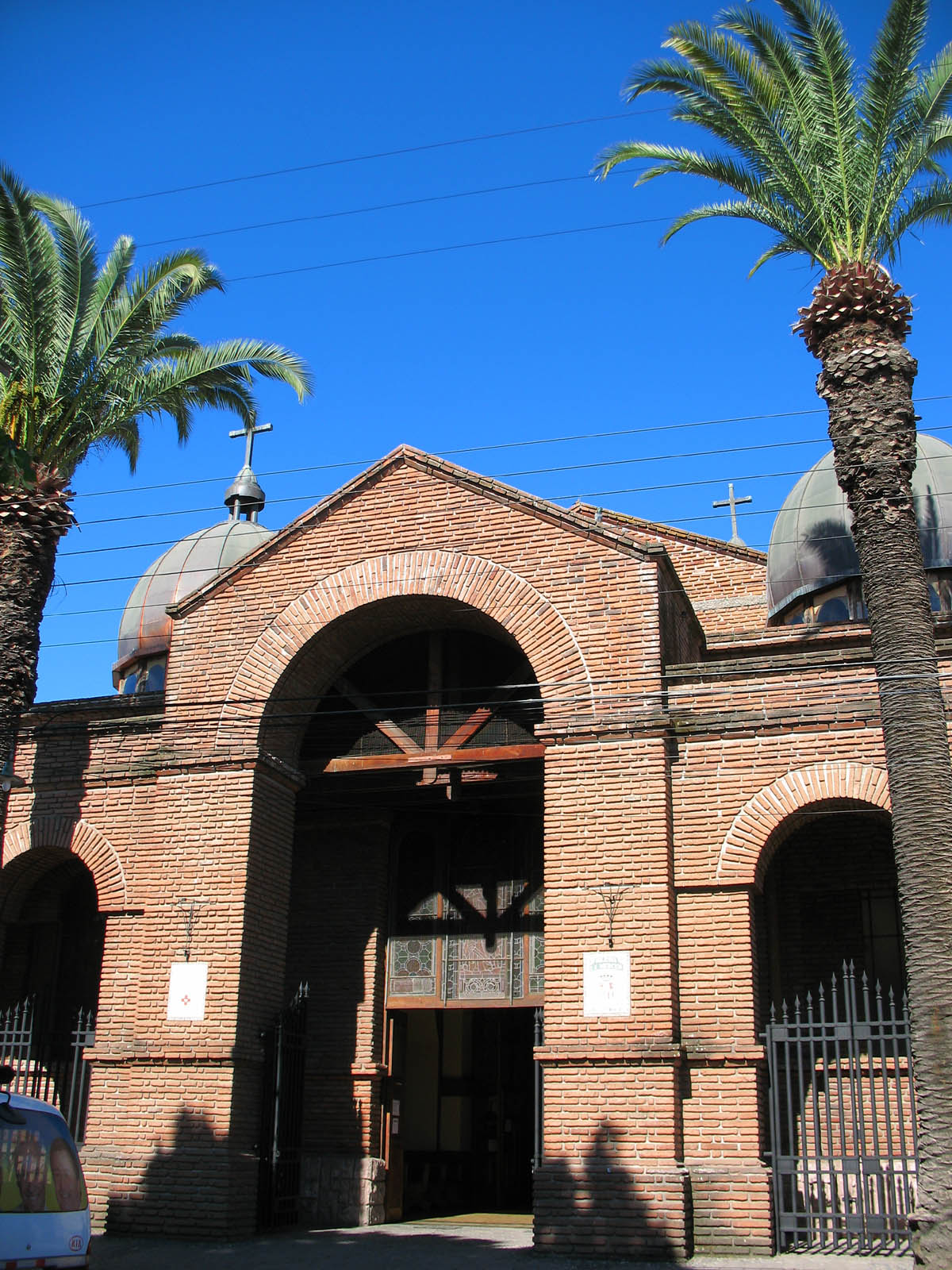 iglesia carmen